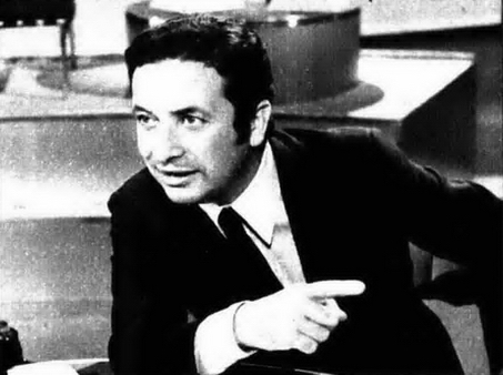 Italian presenter Luciano Rispoli